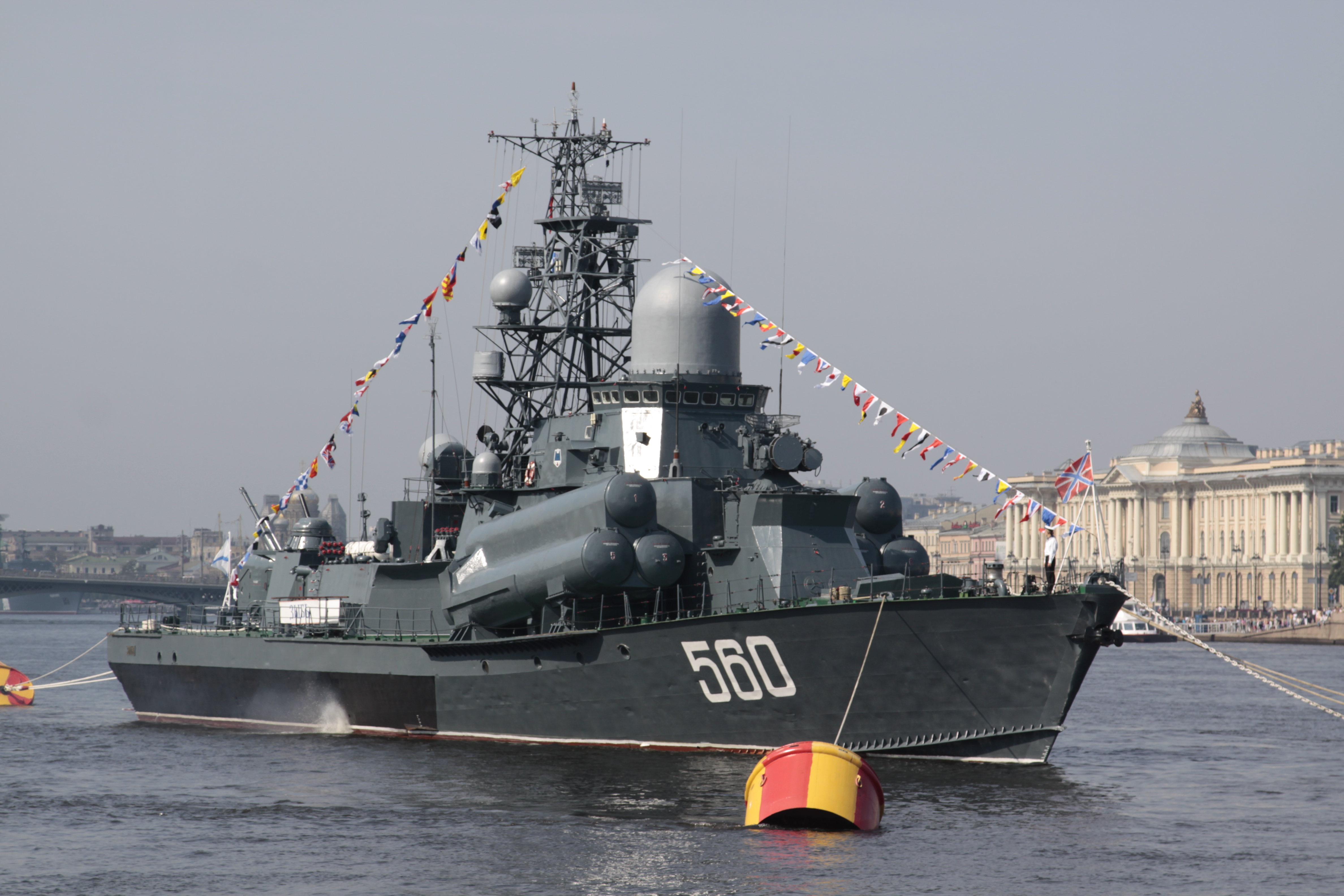 Малый ракетный корабль «Зыбь» на параде ВМФ в Санкт-Петербурге.